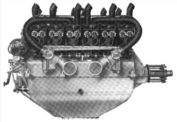 Lancia V-12 motore aeronautico con cil. individuali e unica valvola vista dei carburatori